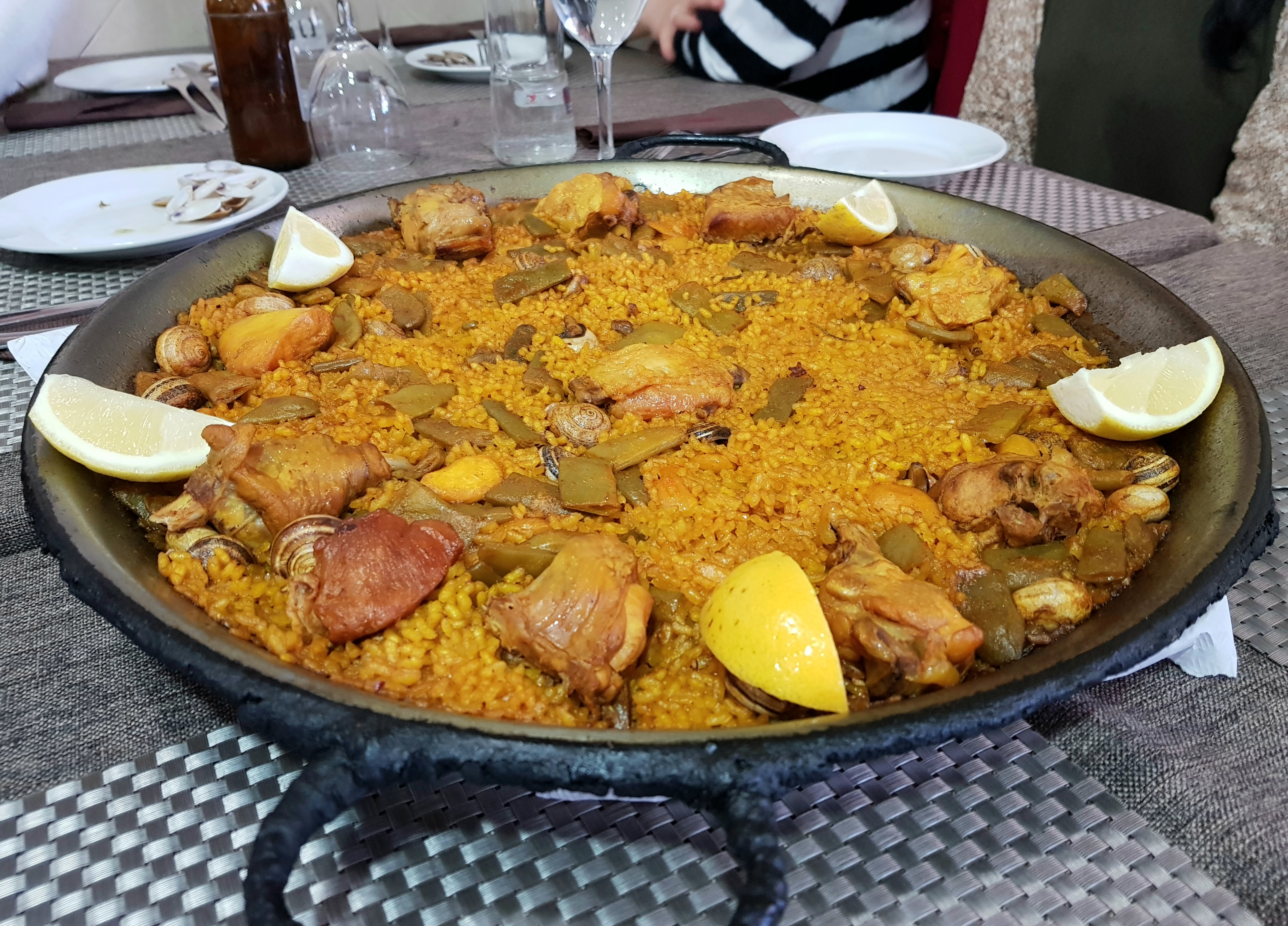 Paella amb caragols a un restaurant de la Patacona, Alboraia.